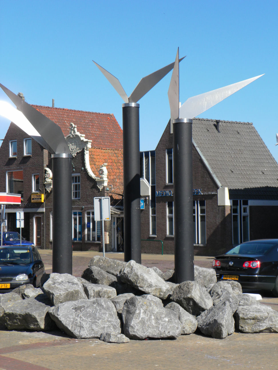 De grins fan greide en wetter in Lemmer.